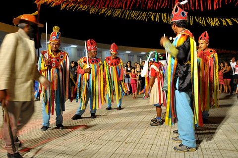 Apresentação de grupo de cultura popular do Rio Grande do Norte, Brasil.